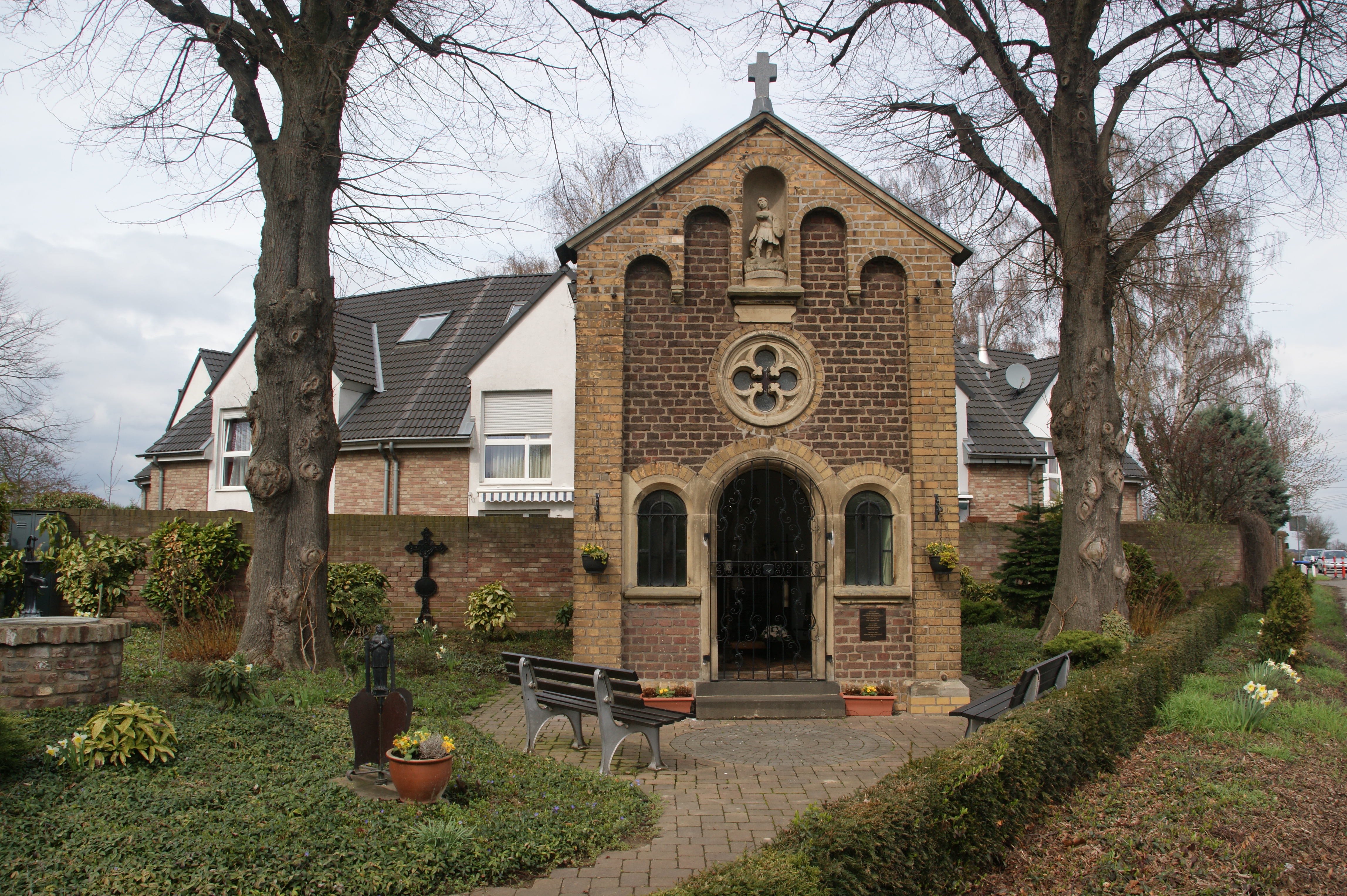 Schutzengelkapelle in Pulheim-Geyen